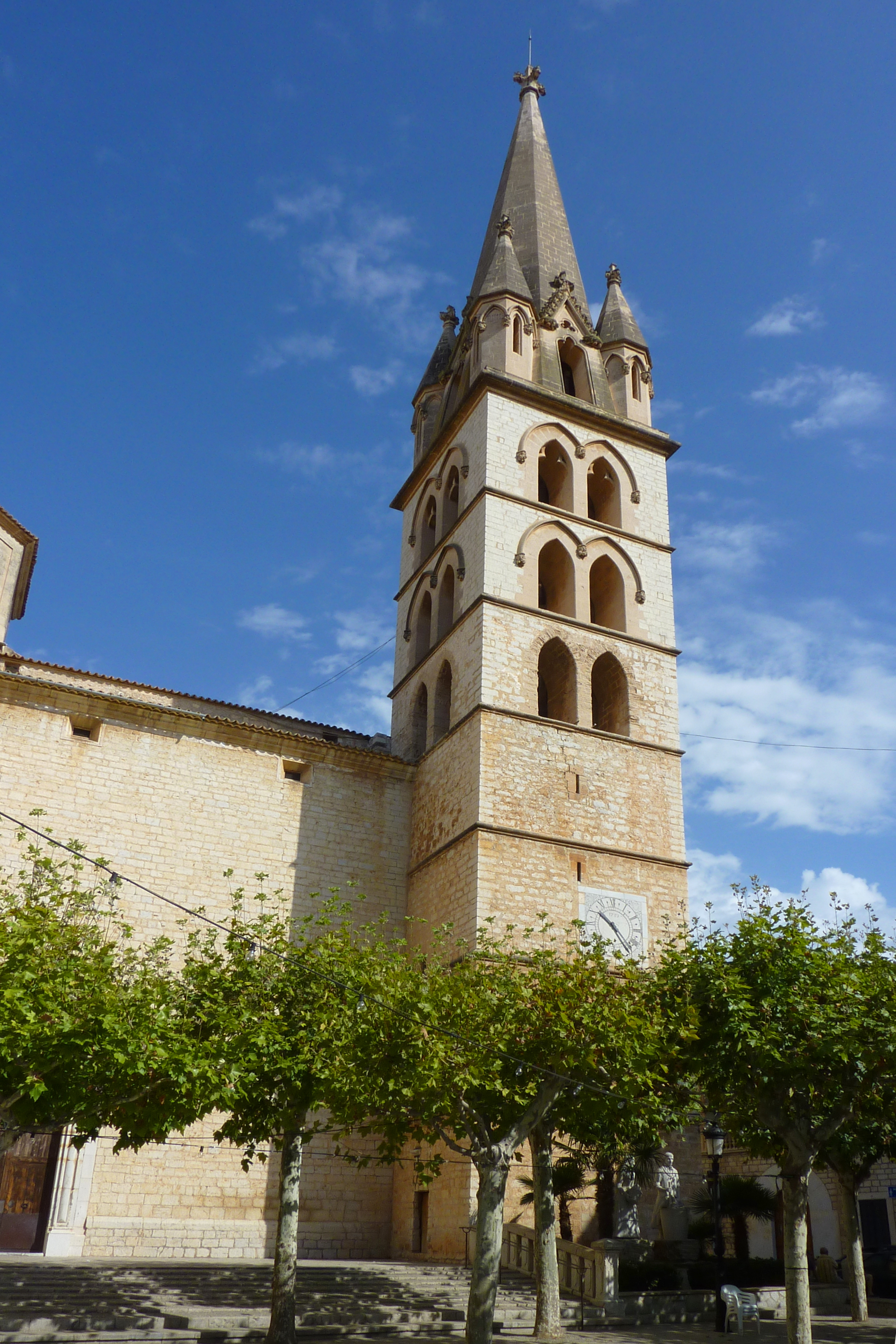 Iglesia de Santa Maria de Robines en Binissalem (Mallorca)